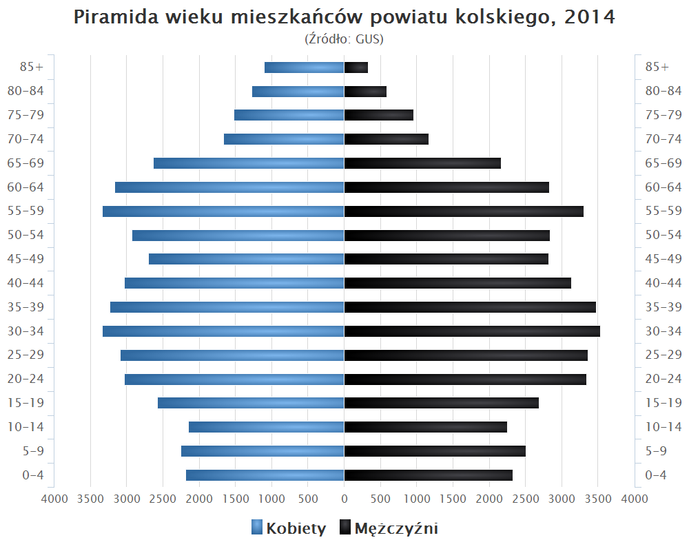 Piramida wieku mieszkańców powiatu kolskiego, 2014